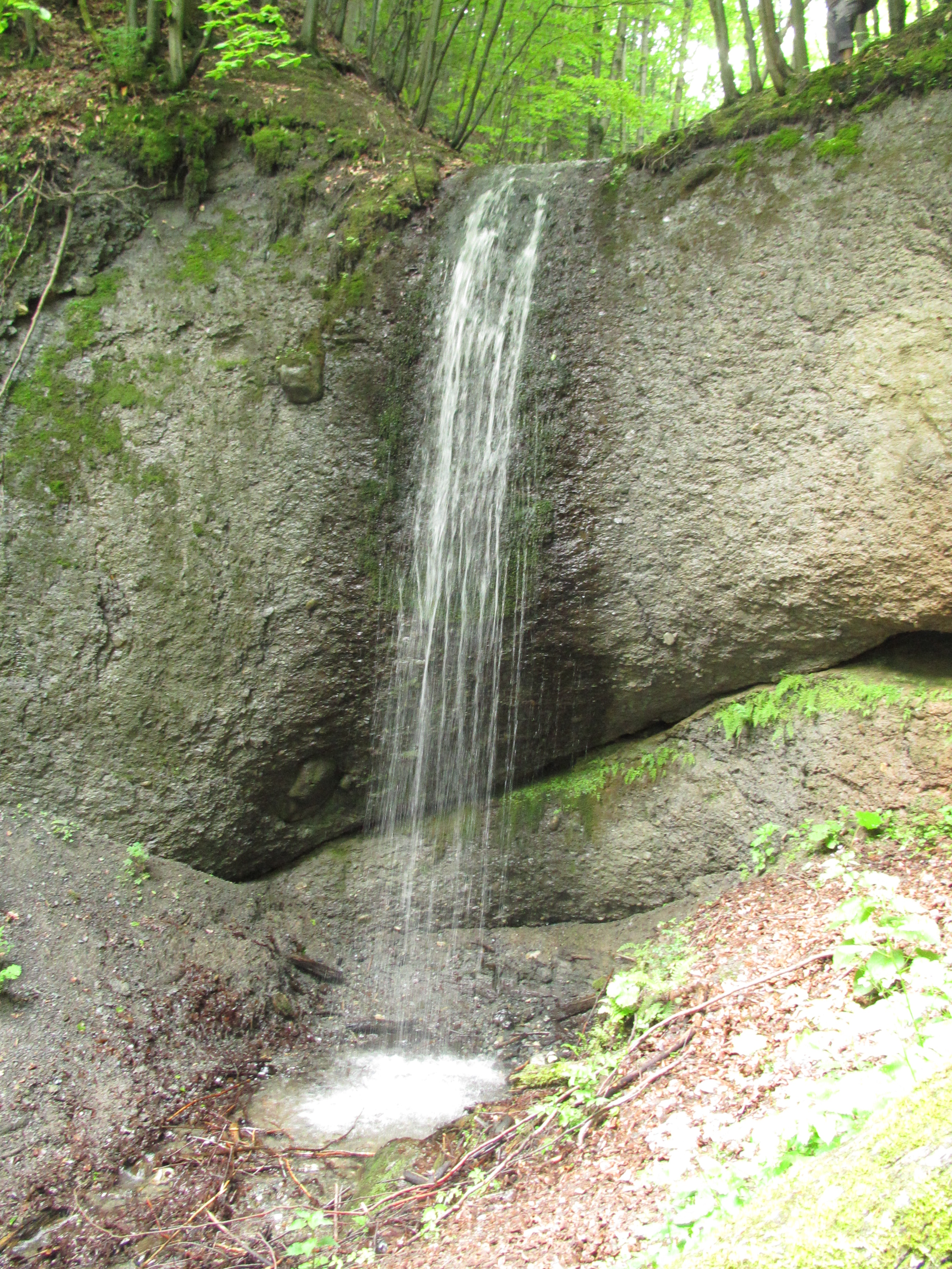 Марківський водоспад